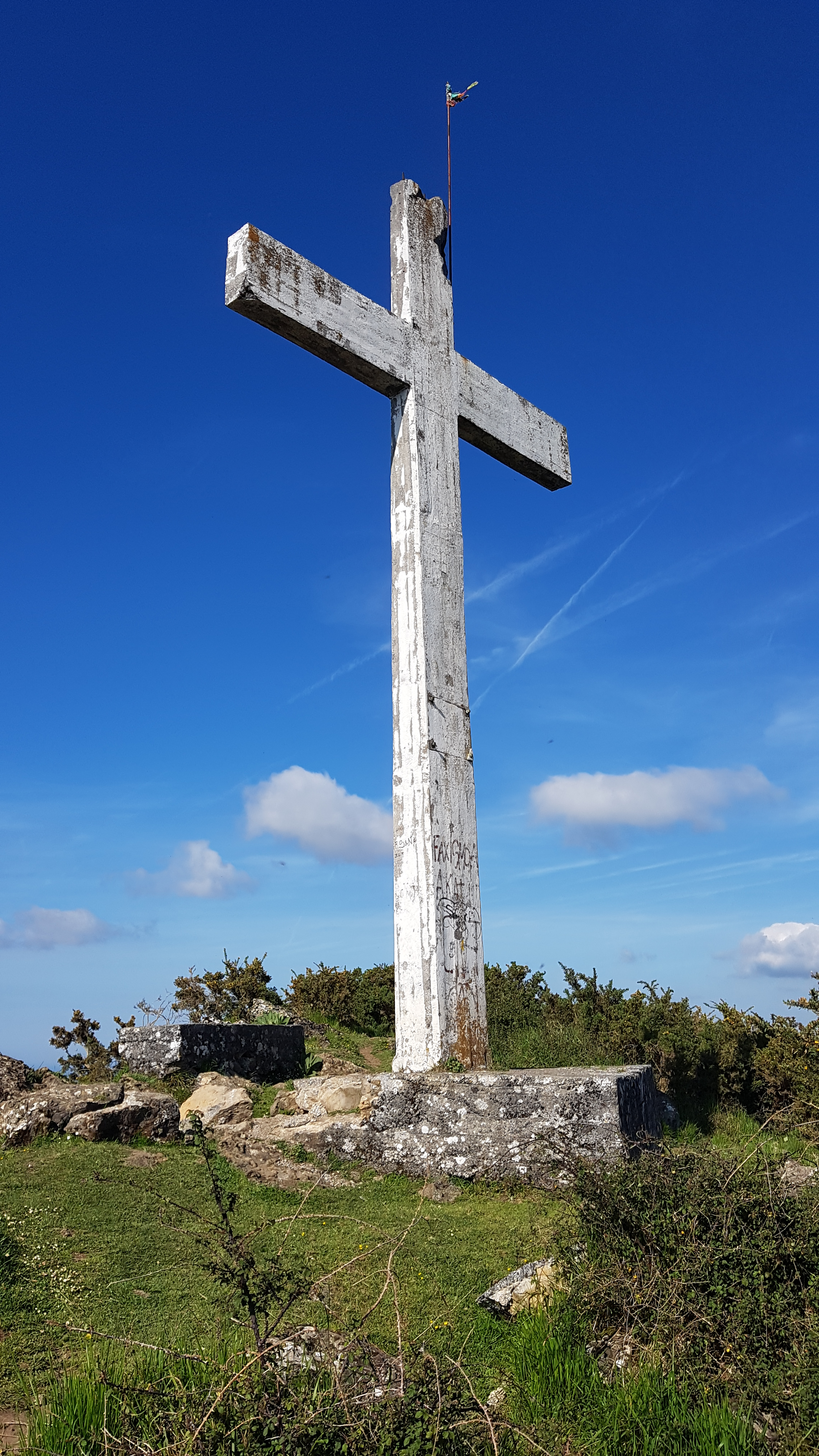 Buruntzako gurutzea